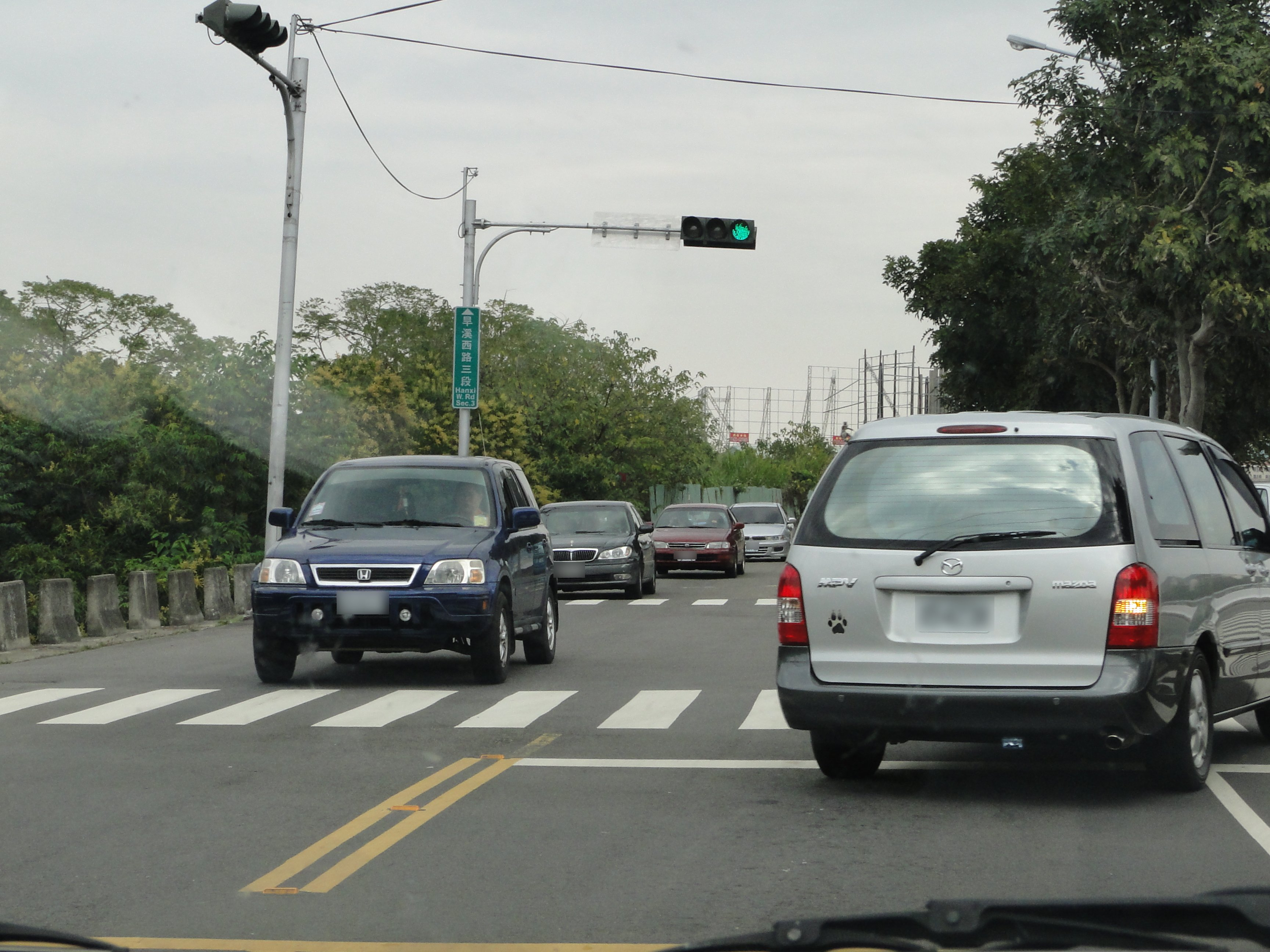 中文（台灣）: 台灣台中市旱溪西路三段一景。